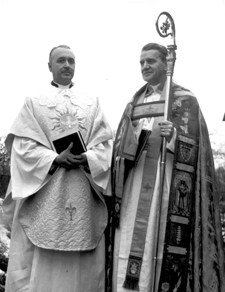 Det är sannerligen inte vanligt att en kyrkoherde installeras i sitt ämbete blott några dagar efter sitt tillträde, men det fick Brännkyrkas förste eller tredje kyrkoherde – beroende på om man talar om den nu minskade eller tidigare odelade församlingen – Arne Branderud vara med om på söndagen, när han insattes i sitt ämbete av biskop Helge Ljungberg. Installationsakten ägde rum blott fen dagar efter tillträdet, Trettondagen är dessutom i kyrkoherde Branderuds fall i hans egenskap av före detta missionär särskilt lämplig, ty det är missionens stora offerdag i vårt land.